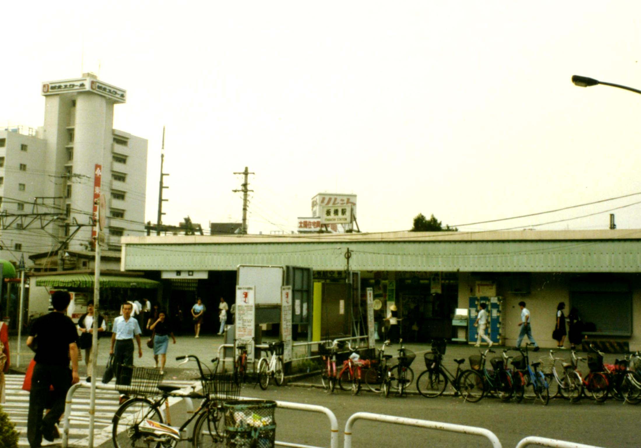 板橋駅（1990年撮影）